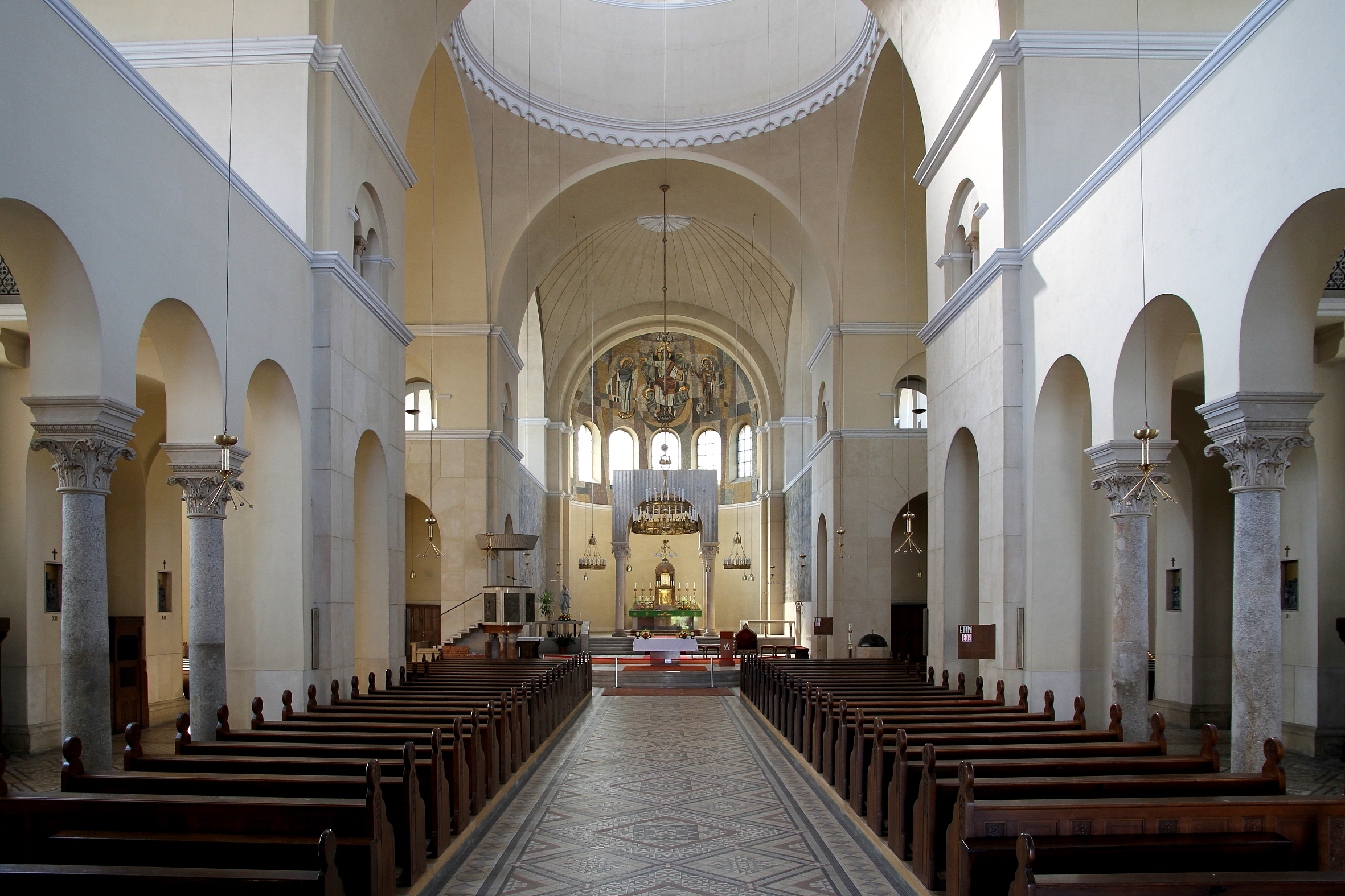 Die Innenansicht der katholische Pfarrkirche hl. Antonius von Padua am Antonplatz in Wien.